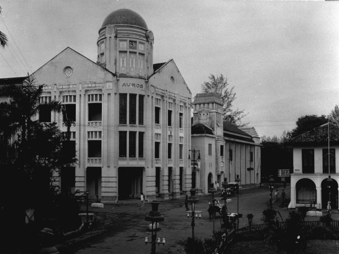 Foto. Vanaf 1880 ontwikkelde Medan zich in hoog tempo. Er waren toen al zo'n 60 winkels, vaak in handen van Chinezen. In 1885 begon er een krant te verschijnen. In 1888 volgde een agentschap van de Nederlandsche Handel-Maatschappij. Nu vestigde de Sultan van Deli zich hier ook en liet er zijn Maimoon Paleis bouwen (1888). En natuurlijk vestigden zich hier allerlei cultuurmaatschappijen, zoals de Deli Maatschappij, de Deli Plantersvereeniging en de Algemeene Vereeniging van Rubberplanters ter Oostkust van Sumatra (AVROS). In 1930 was Medan met ruim 75.000 inwoners de tweede stad van Sumatra. (P. Boomgaard, 2001). Het kantoorgebouw van de A.V.R.O.S. (Algemeene Vereeniging van Rubberplanters ter Oostkust van Sumatra) in Medan